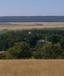 Turm der Gersdorfer Burg